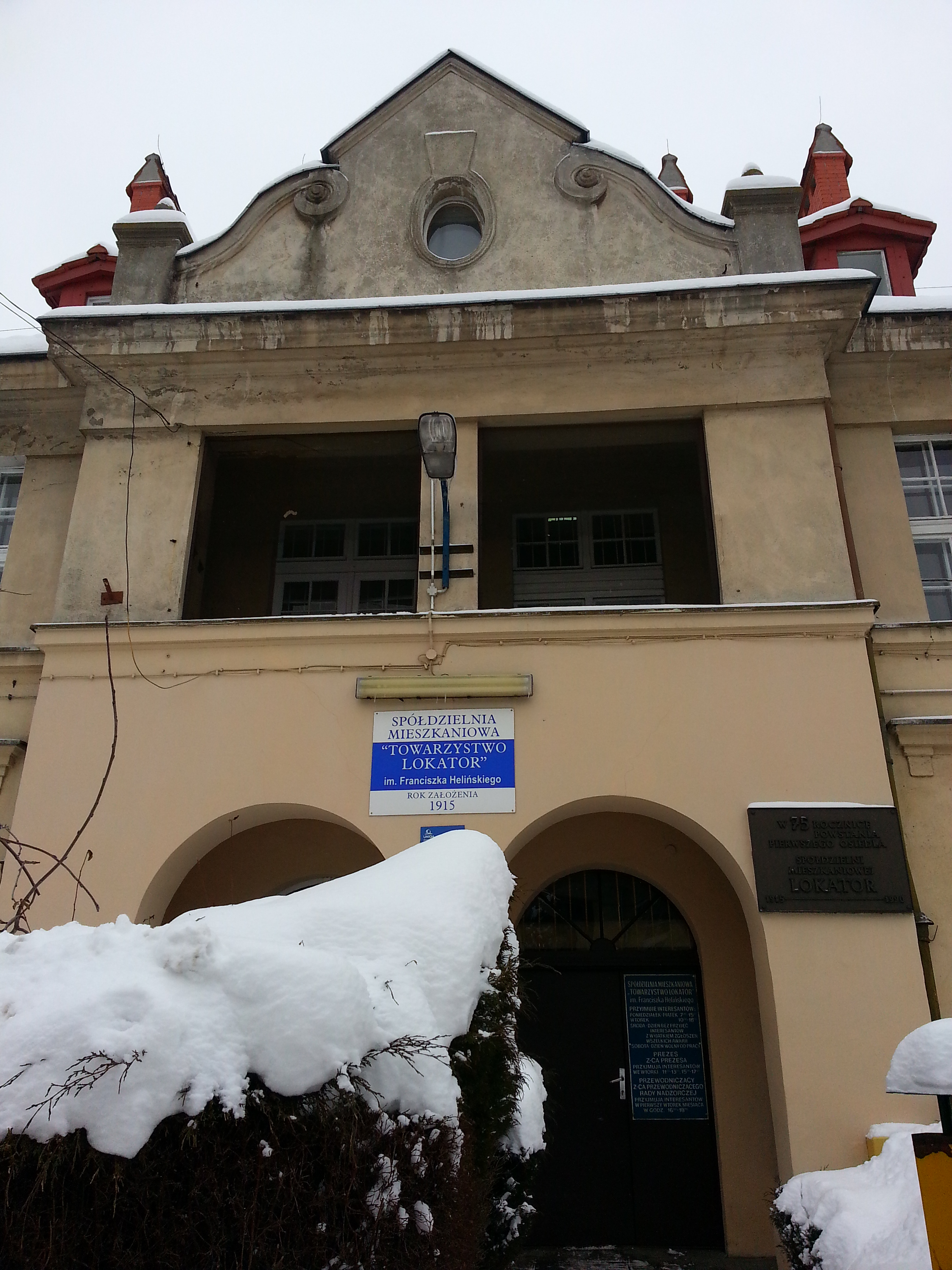 Jeden z trzech budynków eleganckiego osiedla z okresu międzywojennego w łódzkiej dzielnicy Górna.